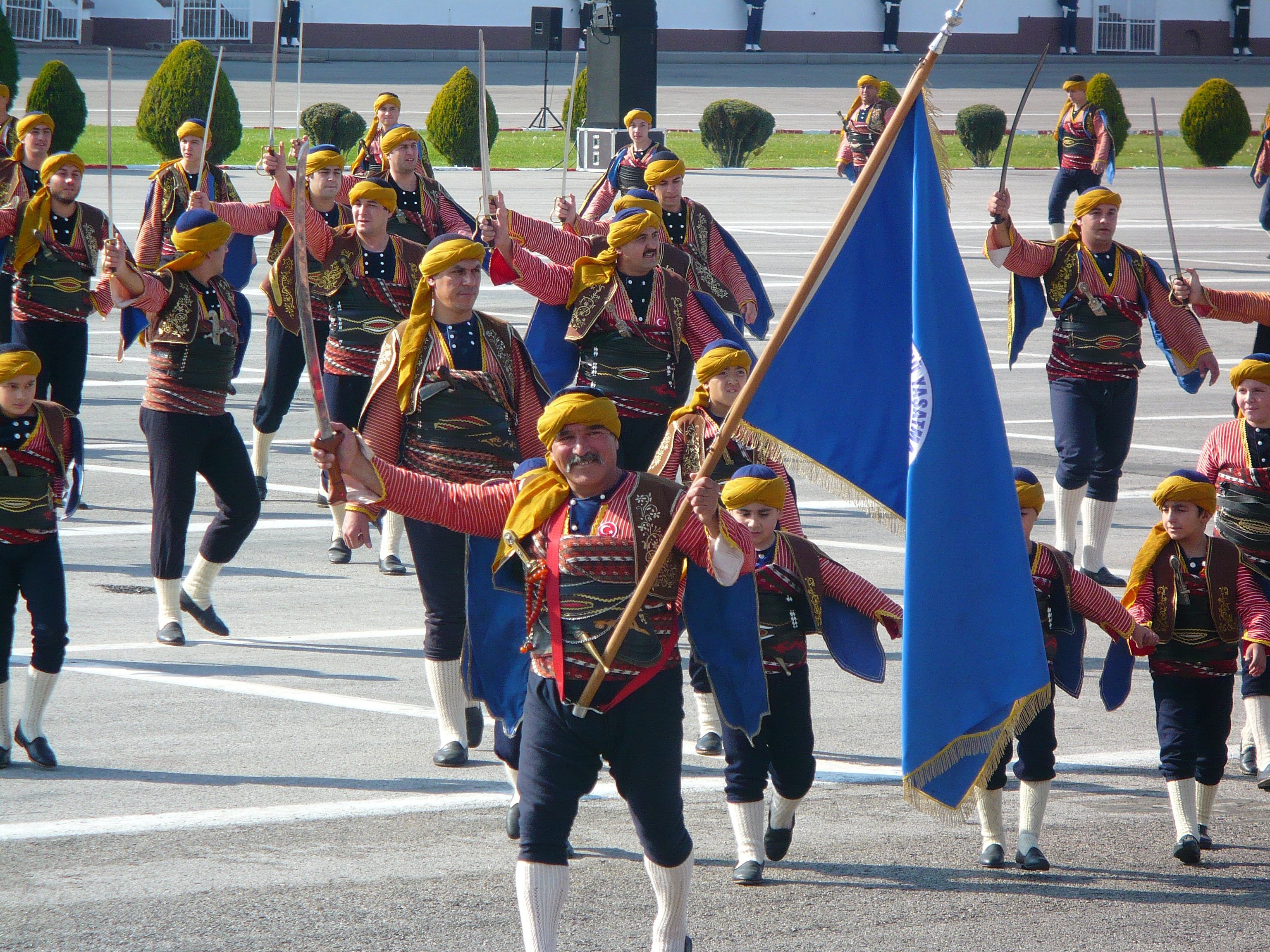 Geleneksel kıyafetleriyle Seymen Alayının 29 Ekim 2008 Cumhuriyet Bayramı geçit gösterisi esnasında alınan bu görüntüde Seymen başı geleneksel olarak en önde yürümekte ve kılıcını kaldırarak halka selam vermektedir. Geleneklere göre Seymen başı kılıcını kaldırarak selam verdiğinde alayda bulunan tüm seymenler kılıç çekerek selama katılırlardı.